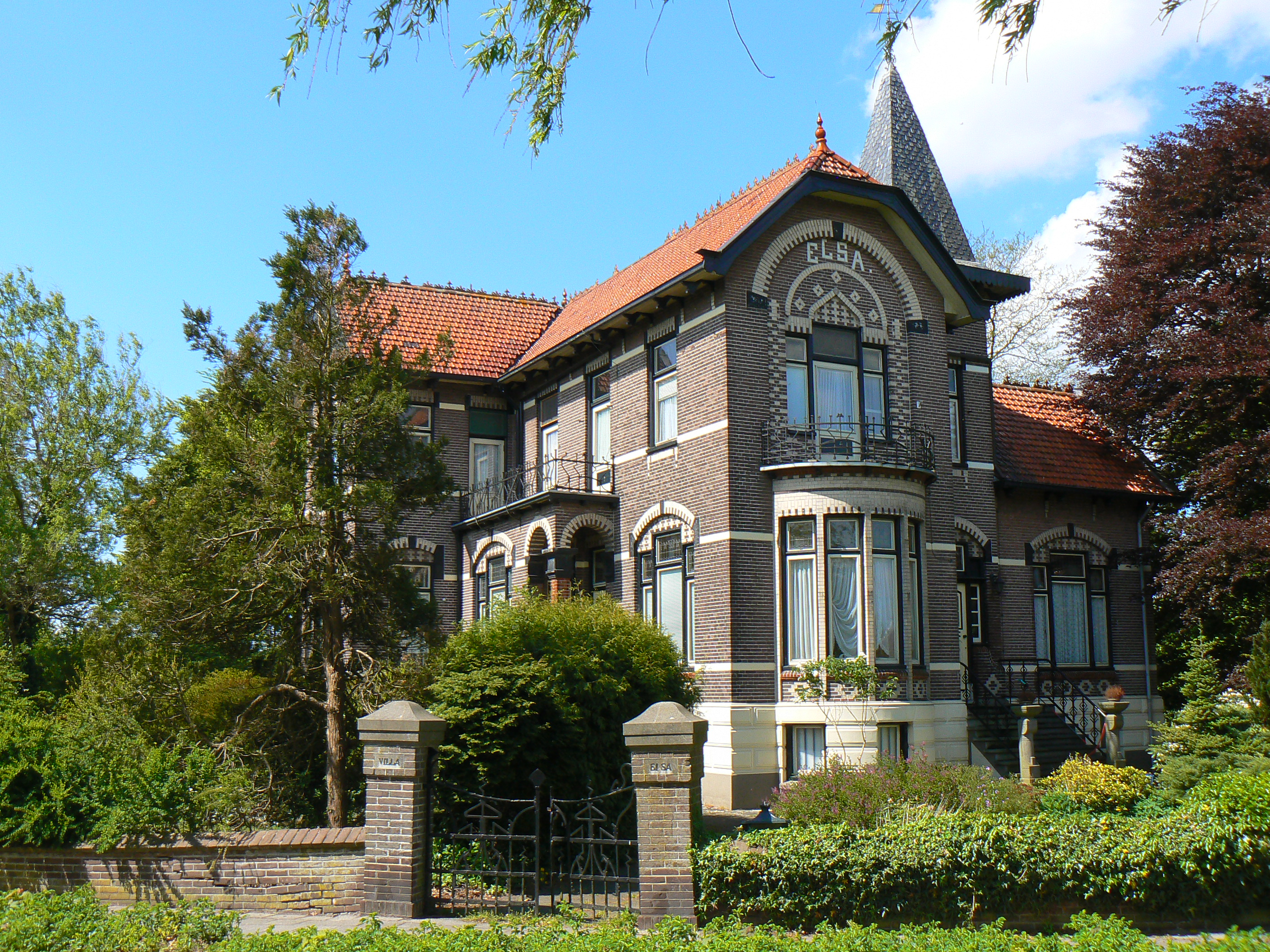 Villa Elsa, F. Clockstraat 31 in Oude Pekela/The Netherlands